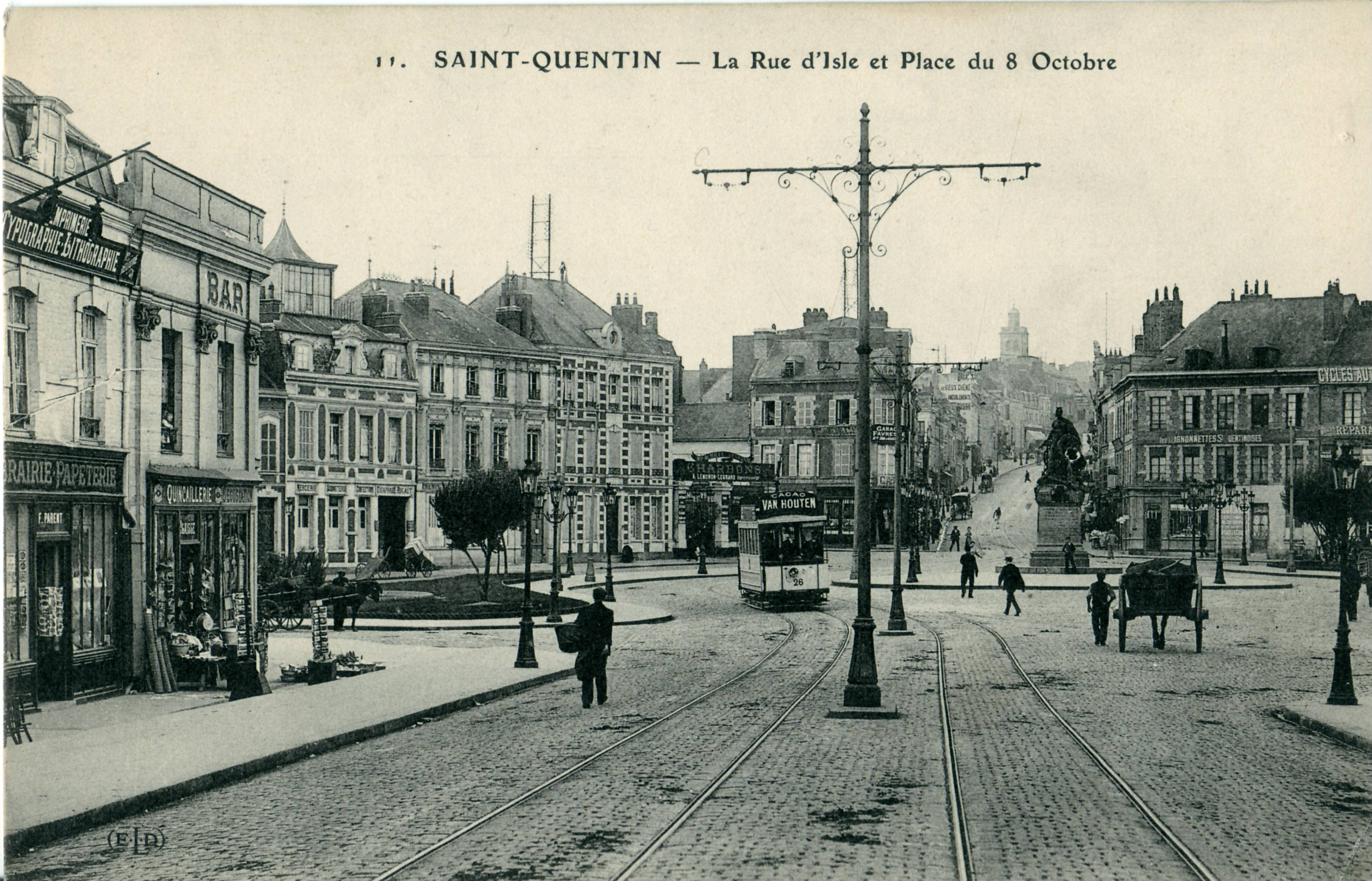 Carte postale ancienne éditée par ELD, N°11 SAINT-QUENTIN : La rue d'Isle et la Place du 8 Octobre.